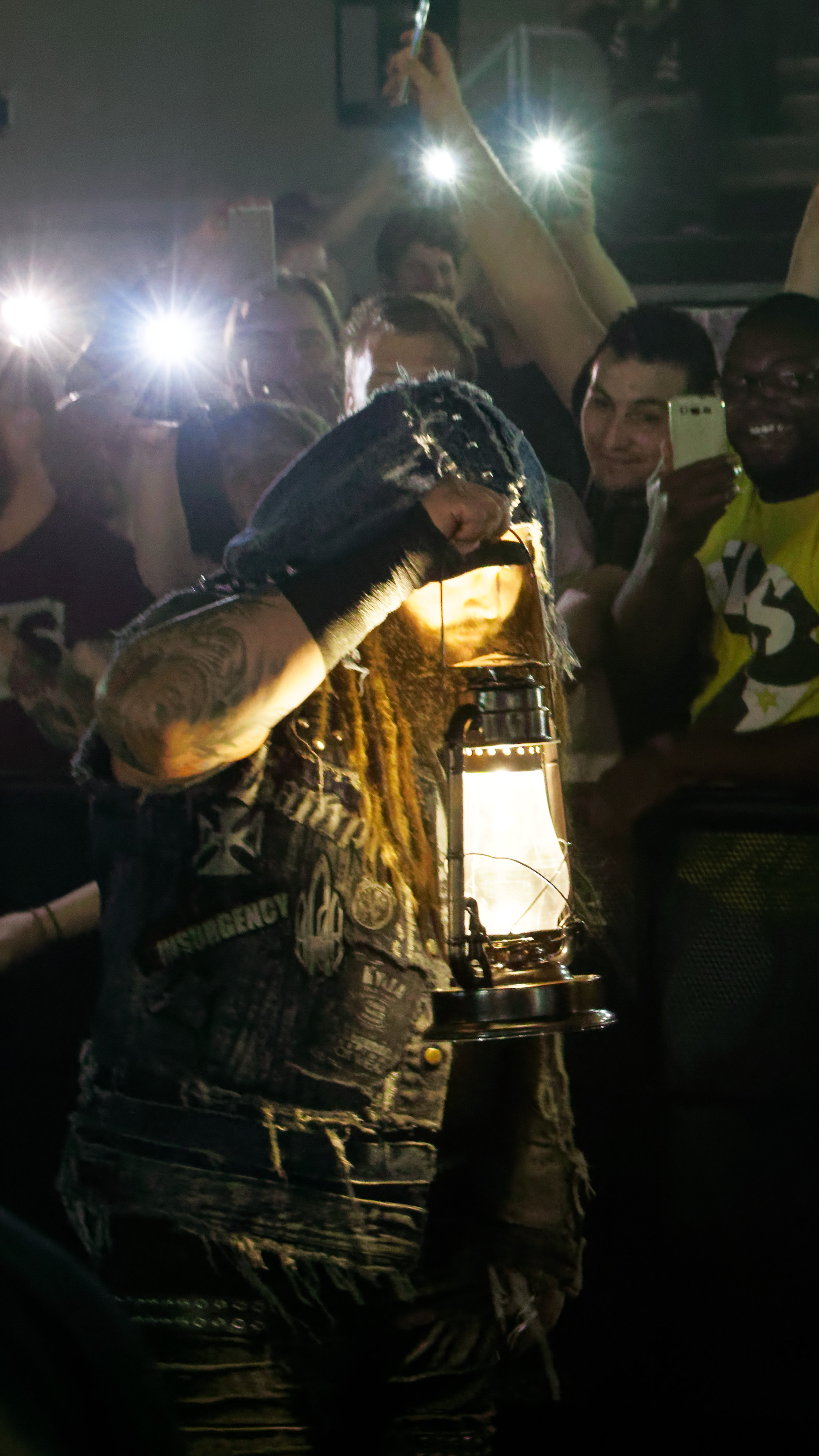 Roman Reigns & Seth Rollins defeat Bray Wyatt & Samoa Joe ( Le vendredi 12 mai, la WWE Live Tour fera escale au Country Hall a Liege pour le spectacle de catch de l'annee! Au programme: des duels impitoyables et des rencontres captivantes entre les meilleures equipes et les plus grands rivaux. )